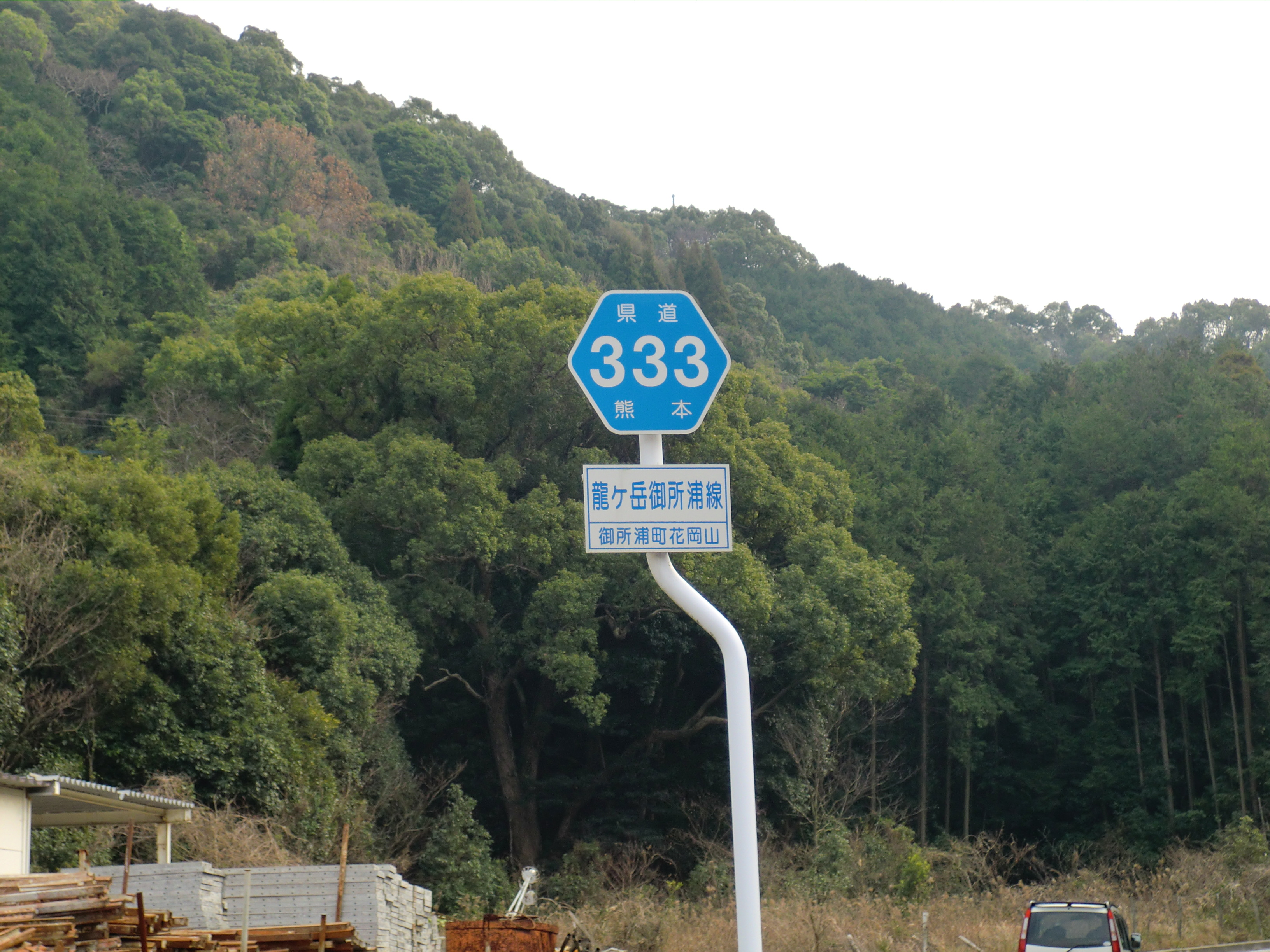 熊本県天草市を通る熊本県道333号線